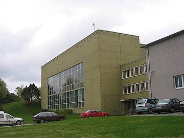 Kavitasjonslaboratoriet på NTNU Tyholt